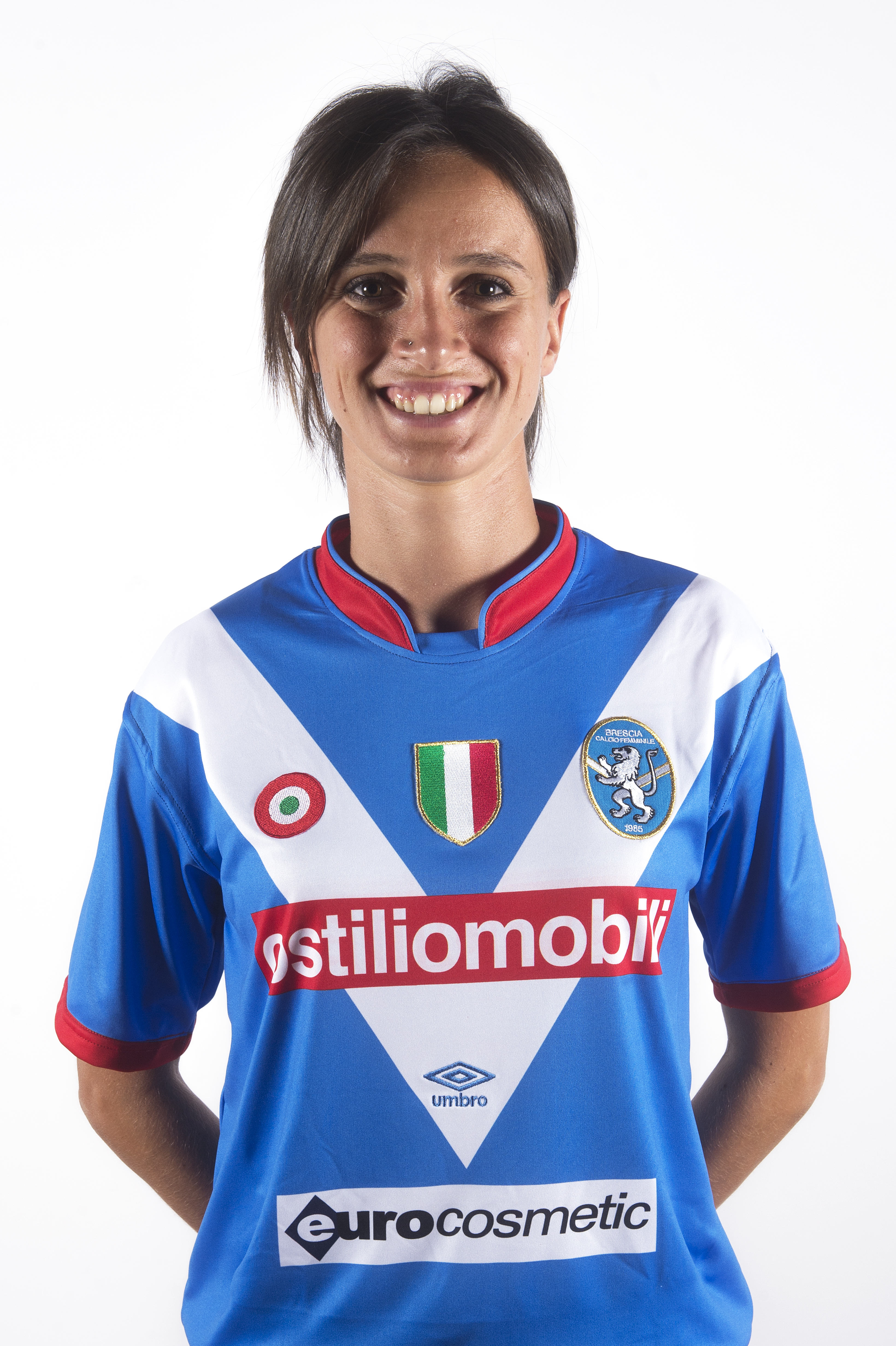 Barbara Bonansea, centrocampista, foto ufficiale Brescia Calcio Femminile stagione 2016-2017.